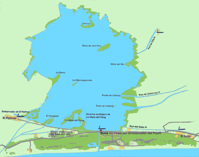 Plànol de l'Albufera de València, basat en una foto i fet en photoshop.